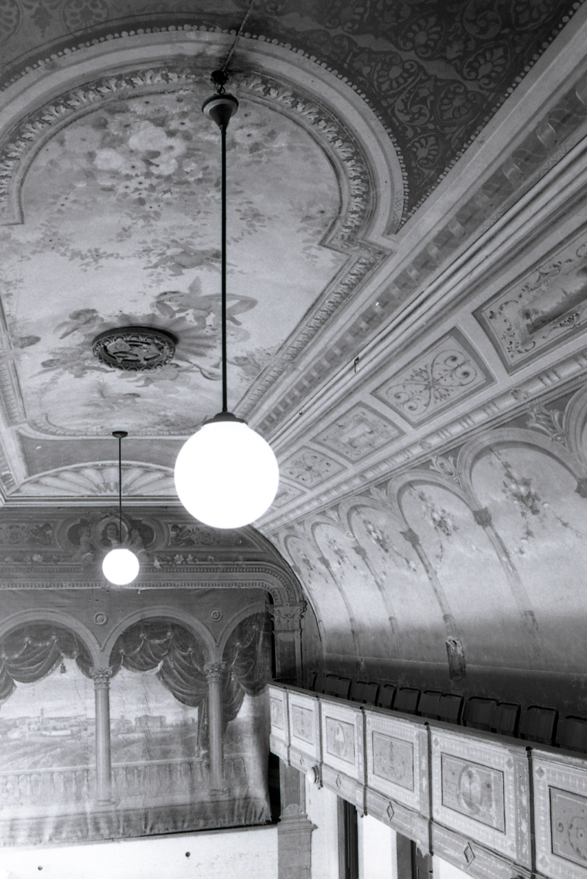 Servizio fotografico : Sassocorvaro, 1981 / Paolo Monti. - Strisce: 7, Fotogrammi complessivi: 37 : Negativo b/n, gelatina bromuro d'argento/ pellicola ; 35 mm. - ((Sul portanegativi: N[I]K[MA]T FP4. - Occasione: Campagna di rilevamento dei Castelli di Francesco di Giorgio Martini. - Fonte: Agenda di Paolo Monti: Nikon Leika 3001-/ Monti 1978 (1978-1982), presso Archivio Paolo Monti. - Fonte: Fattura di Paolo Monti: IV. Commesse/ Fattura n. 09/ Fotografie dei Castelli di Francesco di Giorgio Martini (1982/04/28), presso Archivio Paolo Monti. Secondo viaggio per fotografie interni Castello di Mondavio. Ingrandimenti per Mostra dei Castelli indicati: n. 30 stampe formato 40x60.